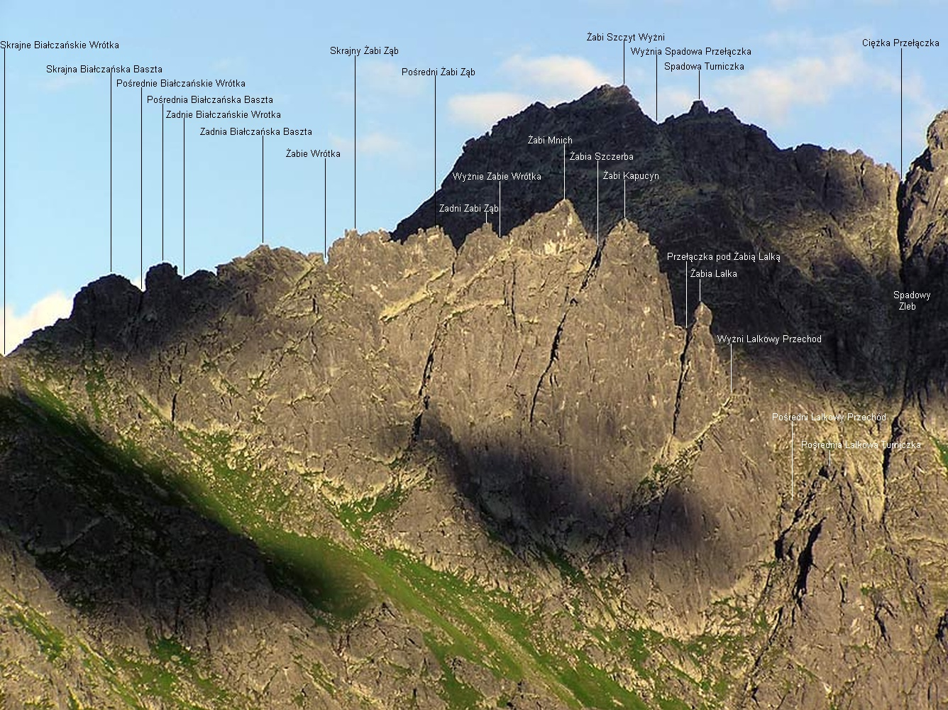 Fragment Grani Żabiego od zachodu